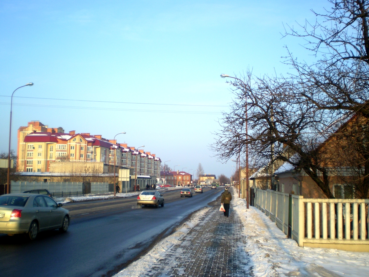 Вул. Рэспубліканская